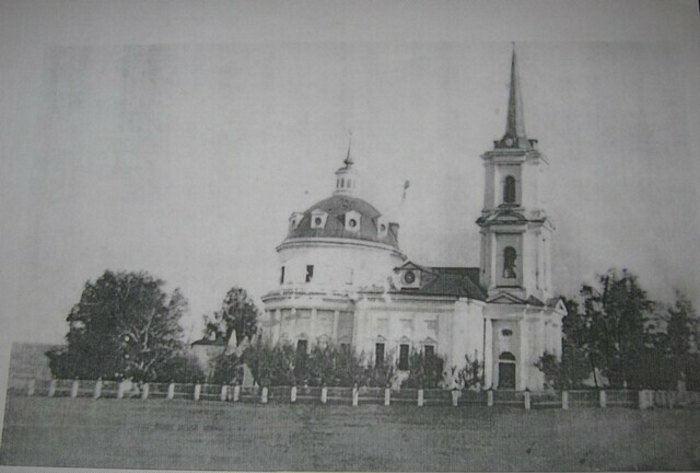 Церковь Троицы Живоначальной в селе Жданово Пильнинского района